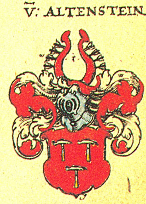 Ritterschaft und Adel in Franken von Altenstein